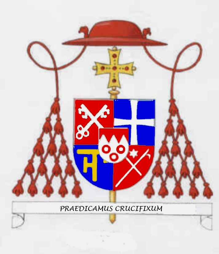 Wappen Julius Kardinal Döpfner, Bischof von Berlin 1957-1961